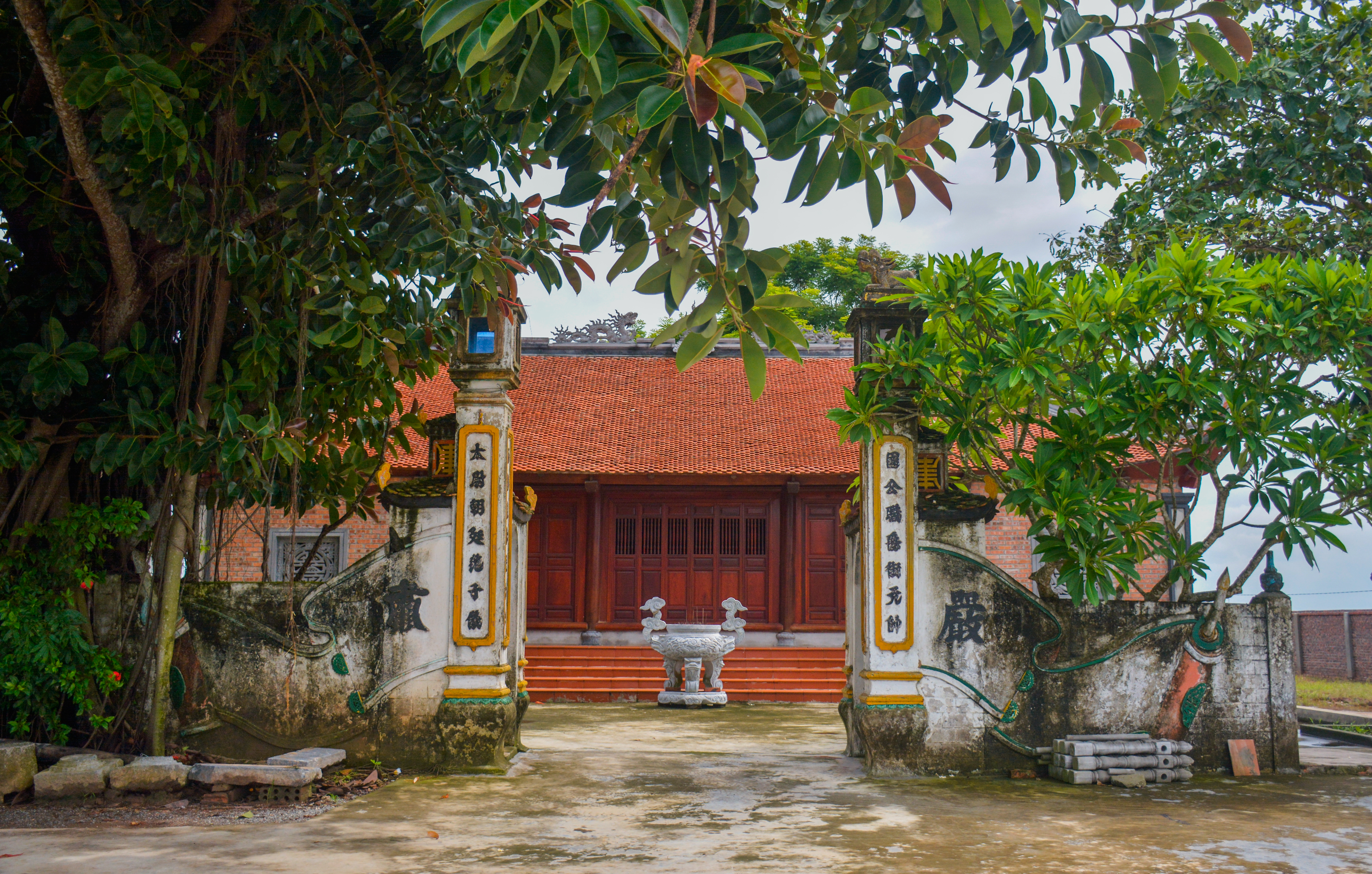 Miếu Vàng nơi thờ tướng Phạm Tử Nghi ở Liên Hòa